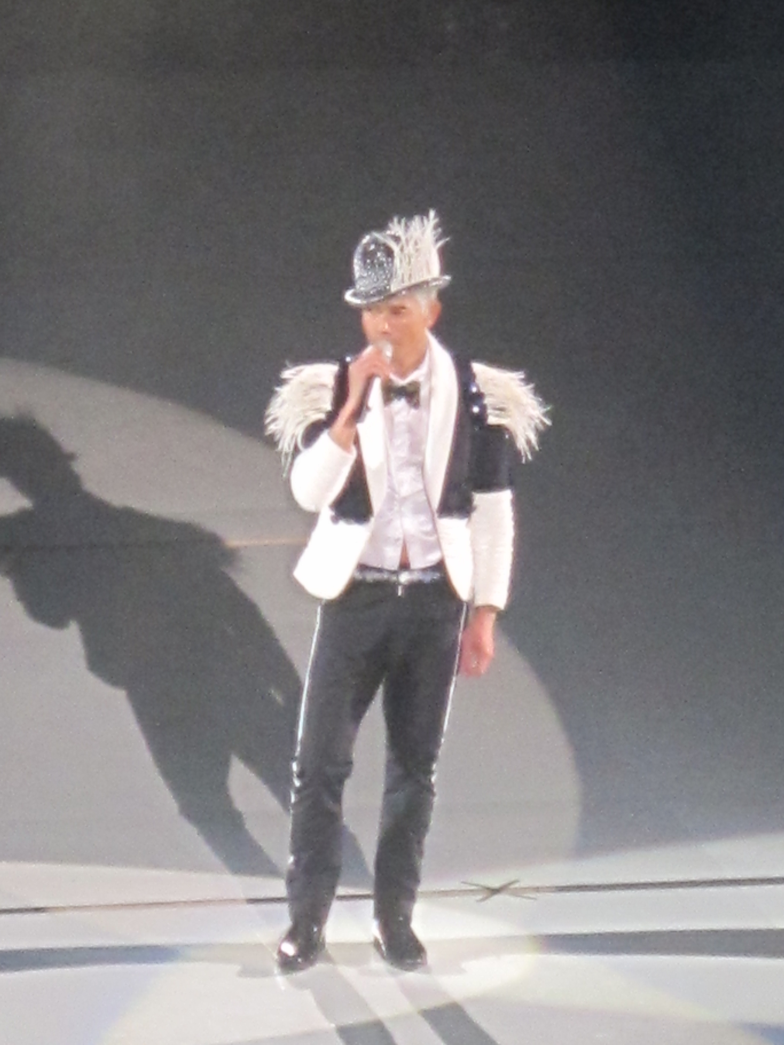 2011 郭富城舞林盛會演唱會